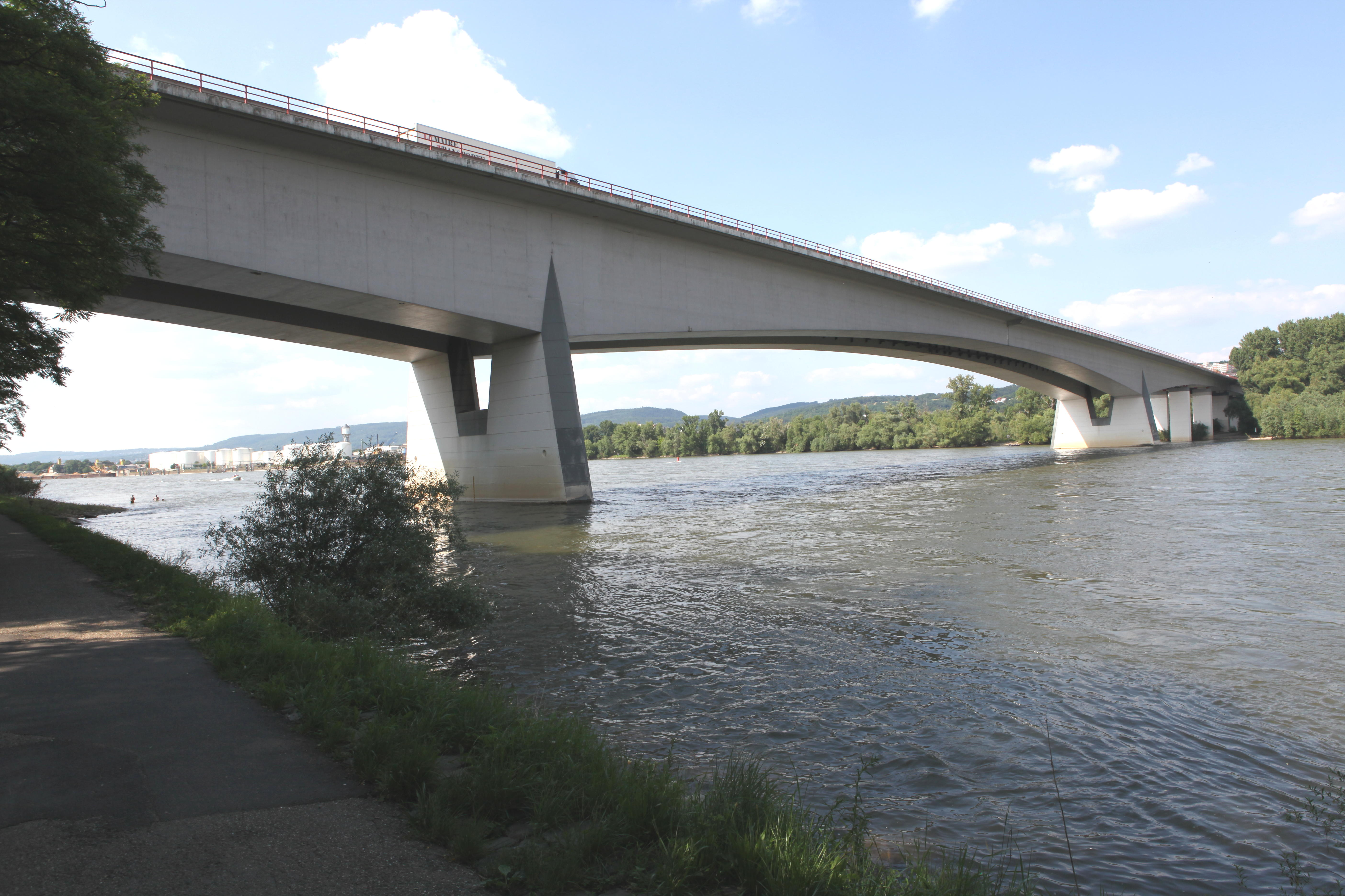 Rheinbrücke Bendorf, gevouteter Spannbetonüberbau